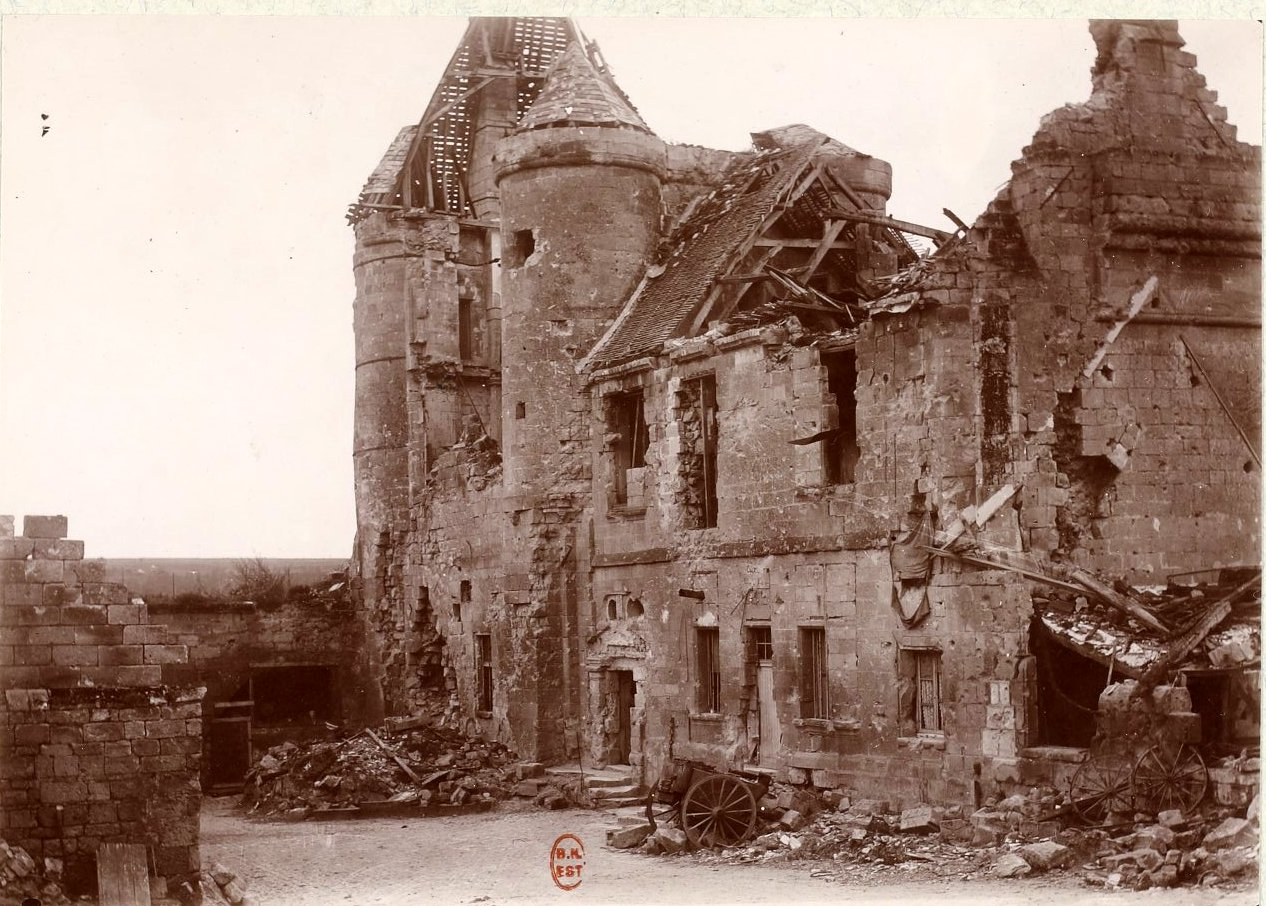 château ruiné après les bombes